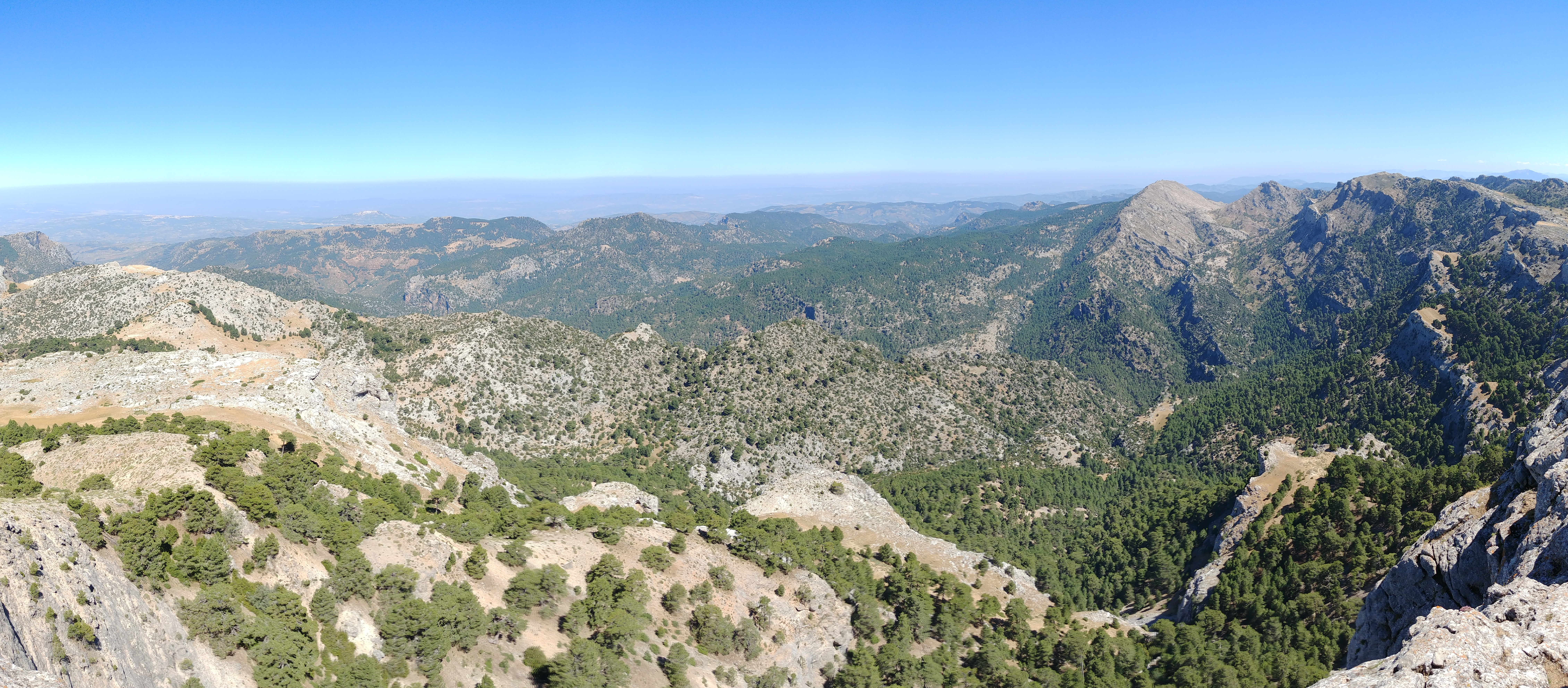 Panorama desde el Alto del Blanquillo de la Sierra de Las Villas.